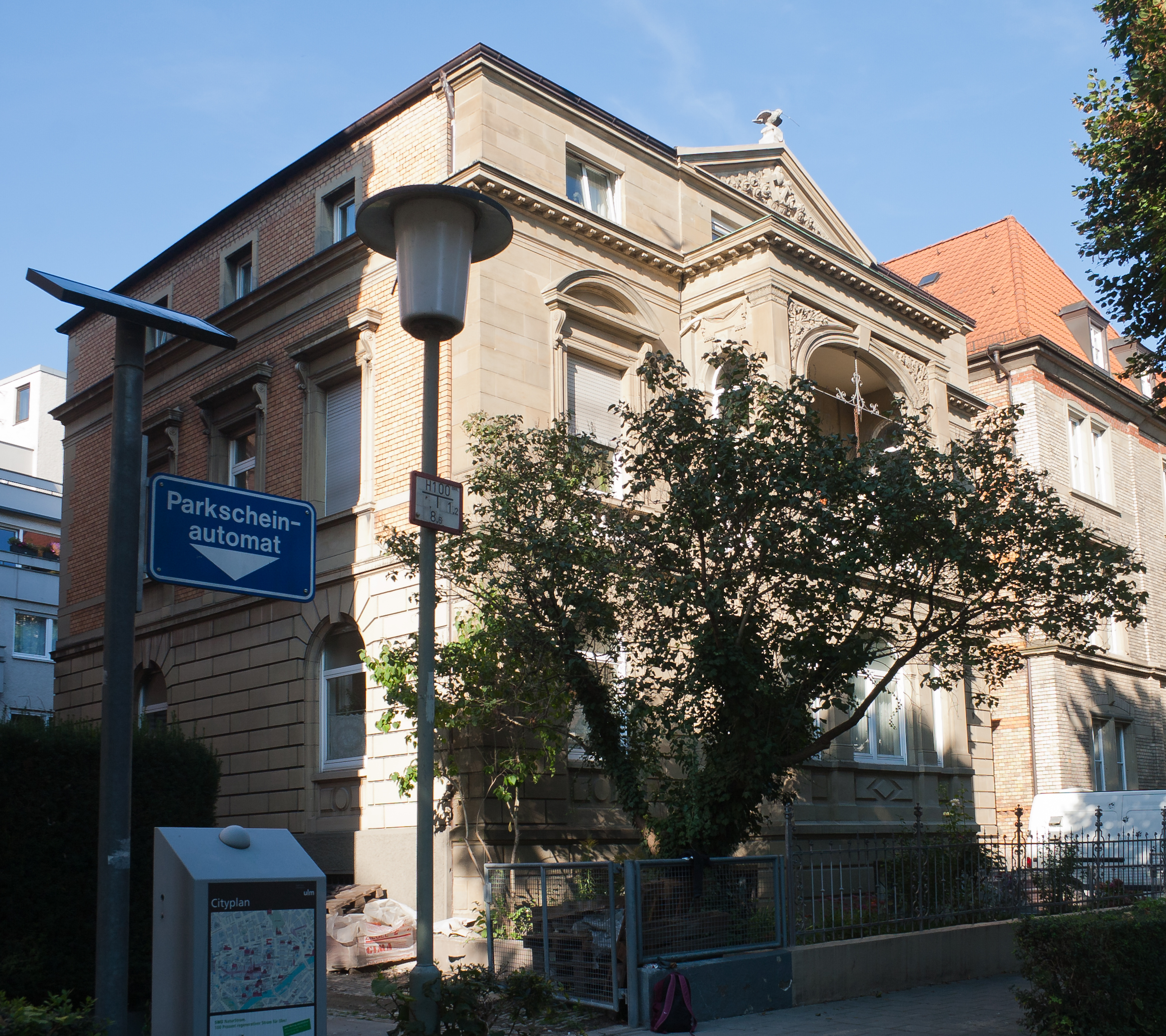 Ulm, Baden-Württemberg, Germany